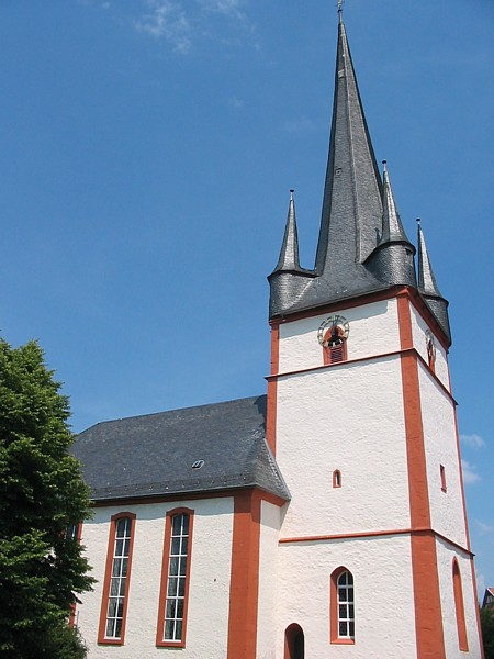 Kirche mit Turm der in der Gotik erbauten ev. Kirche zu Angersbach